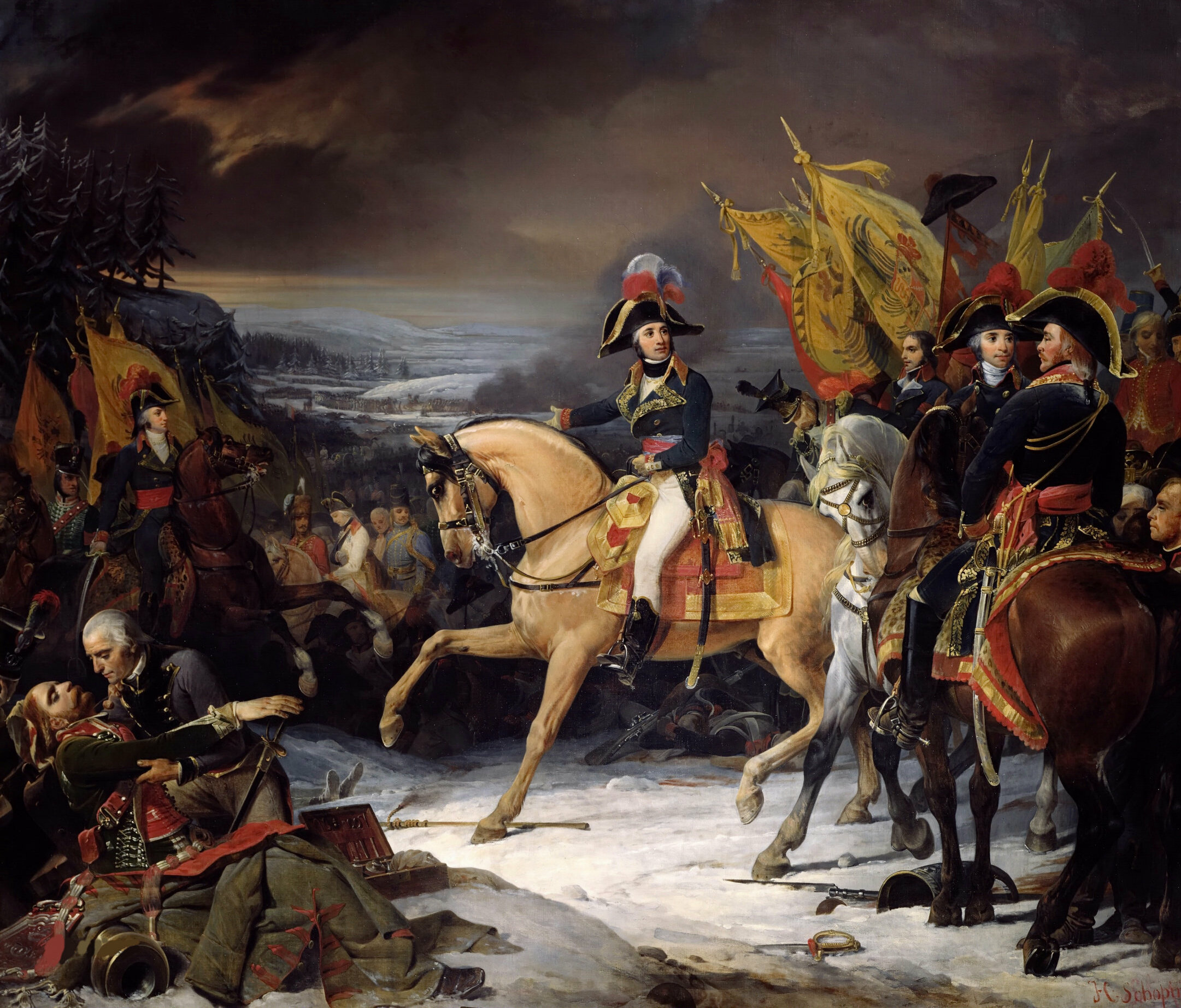 Fin de la bataille de Hohenlinden : le général en chef Moreau, accompagné des généraux Grouchy et Ney, fait sa jonction avec le général Richepance, que suivent les prisonniers autrichiens[1]. ↑ Laurent Gervereau, La guerre sans dentelles, Skira-Flammarion, 2009 - 119 pages (lire en ligne).